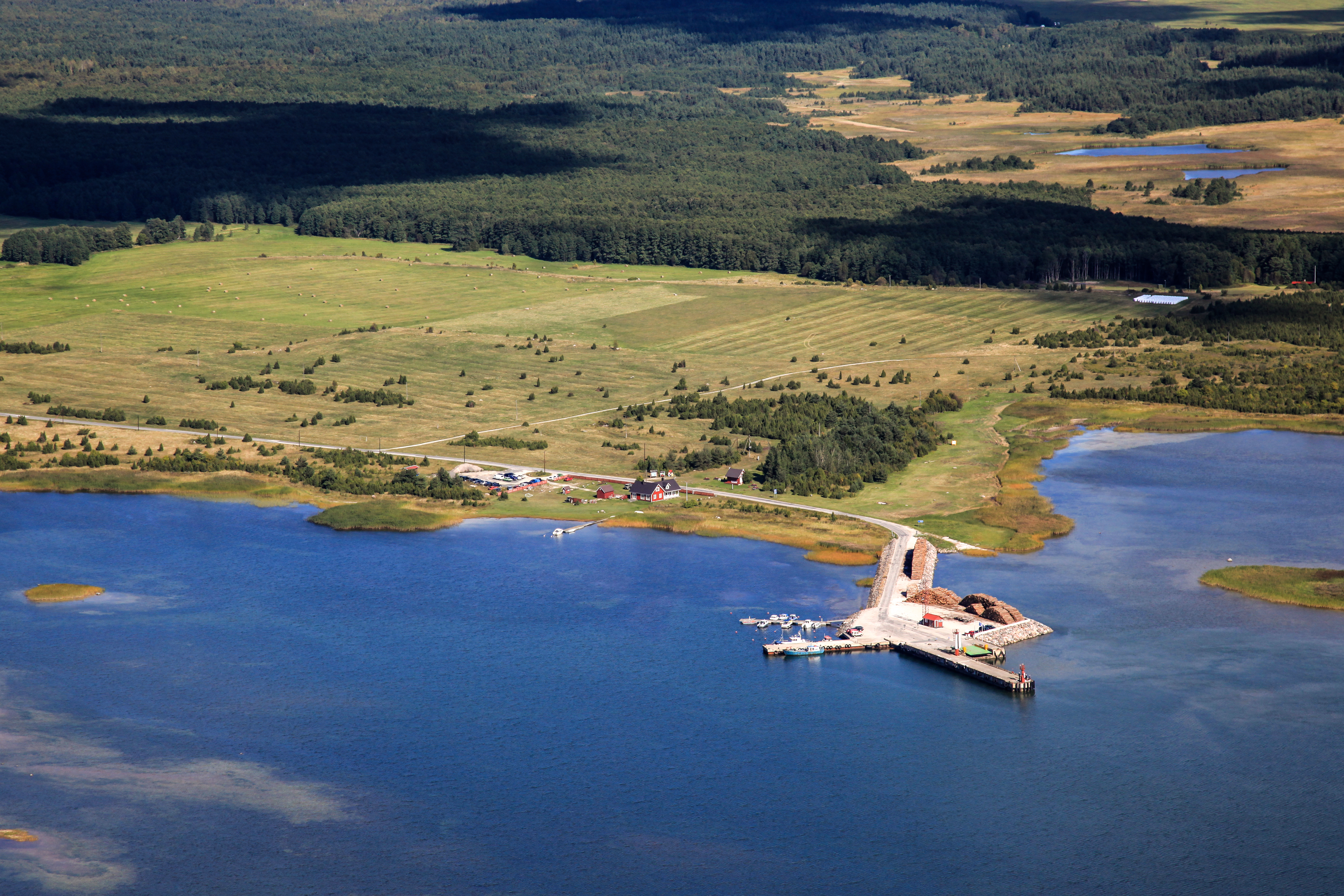 Vormsi sadam 2015